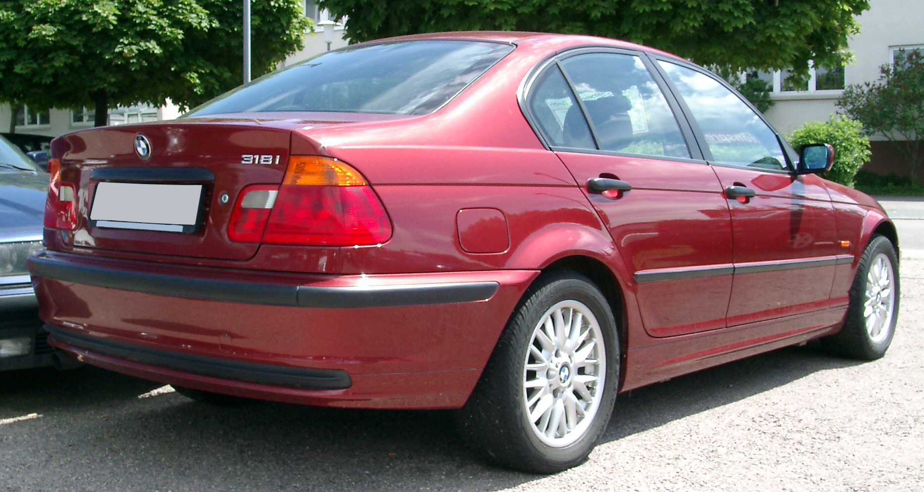 BMW E46, 318 i